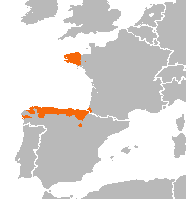 Carte de répartition d'Elona quimperiana